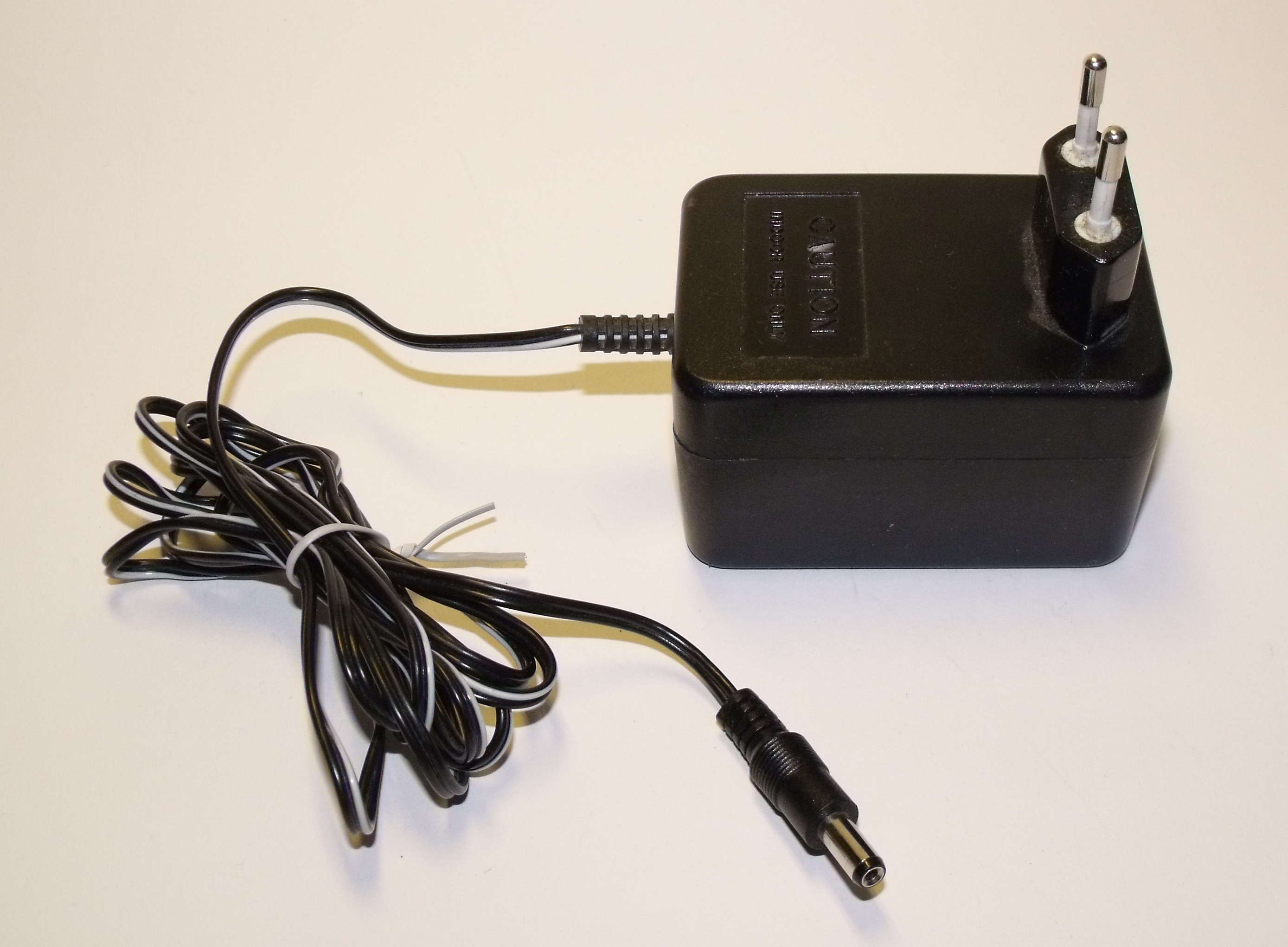 Netzteil von einem unbekannten Gerät